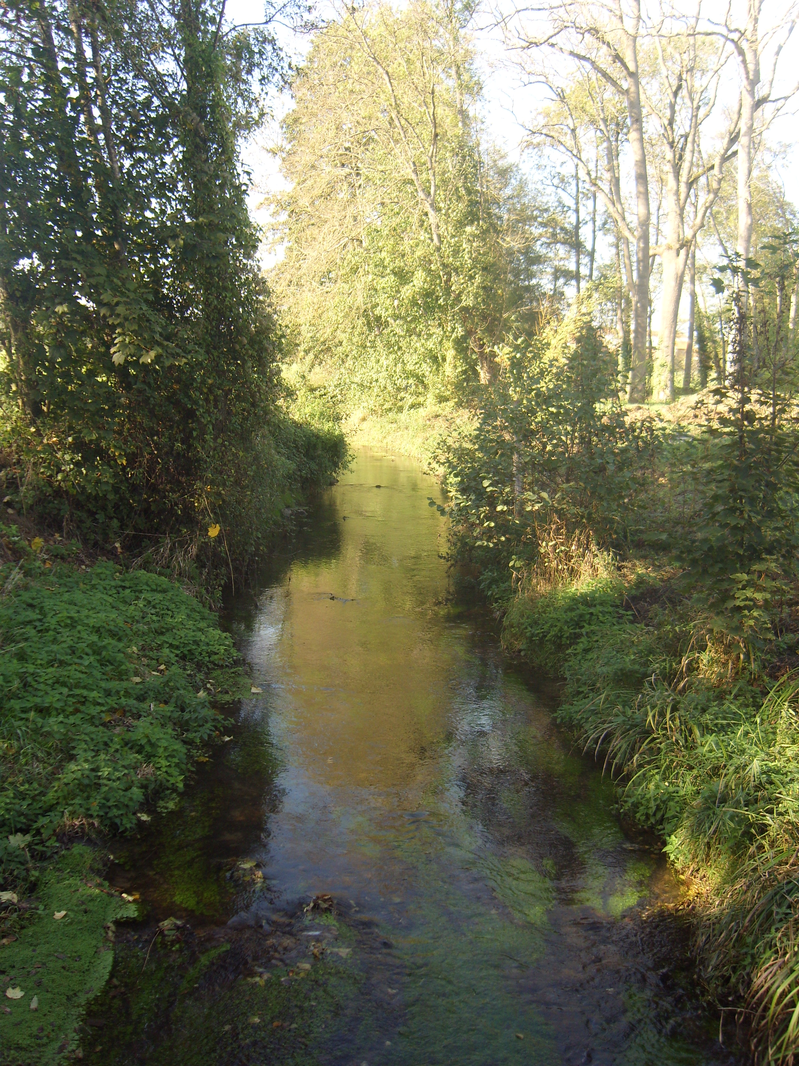 Le Bréon à Fontenay-Trésigny Octobre 2014